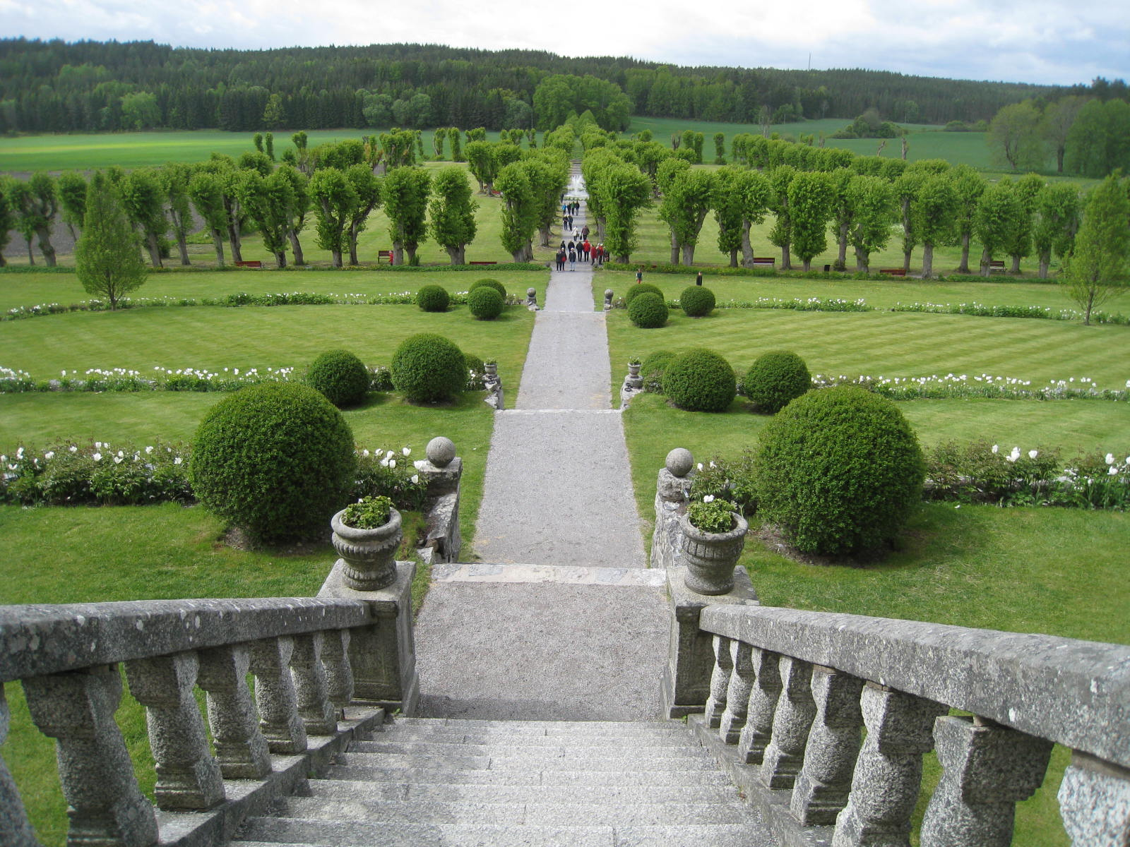 Barockträdgården vid Wenngarns slottspark, Sigtuna, Uppland.